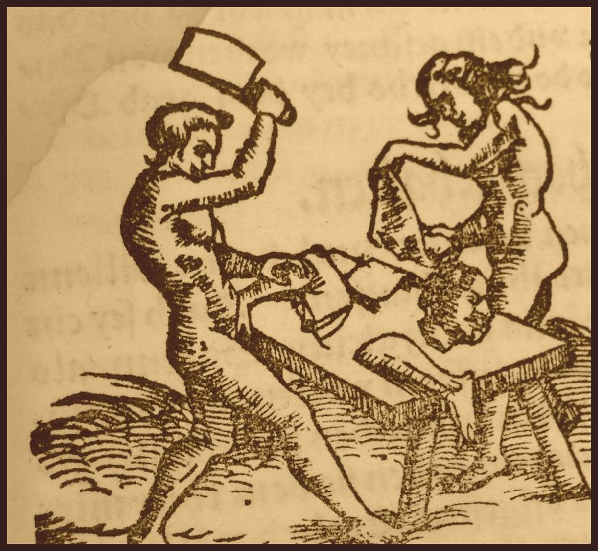 Johannes Herold, Heydenweldt vnd irer Götter anfängcklicher Vrsprung, durch was Verwhänungen den selben etwas vermeynter Macht zügemessen, vmb dero wille[n], sie von den Alten verehert worden ..., Basel 1554, Biblioteka Uniwersytecka w Toruniu - sygnatura Ob.6.III.636.